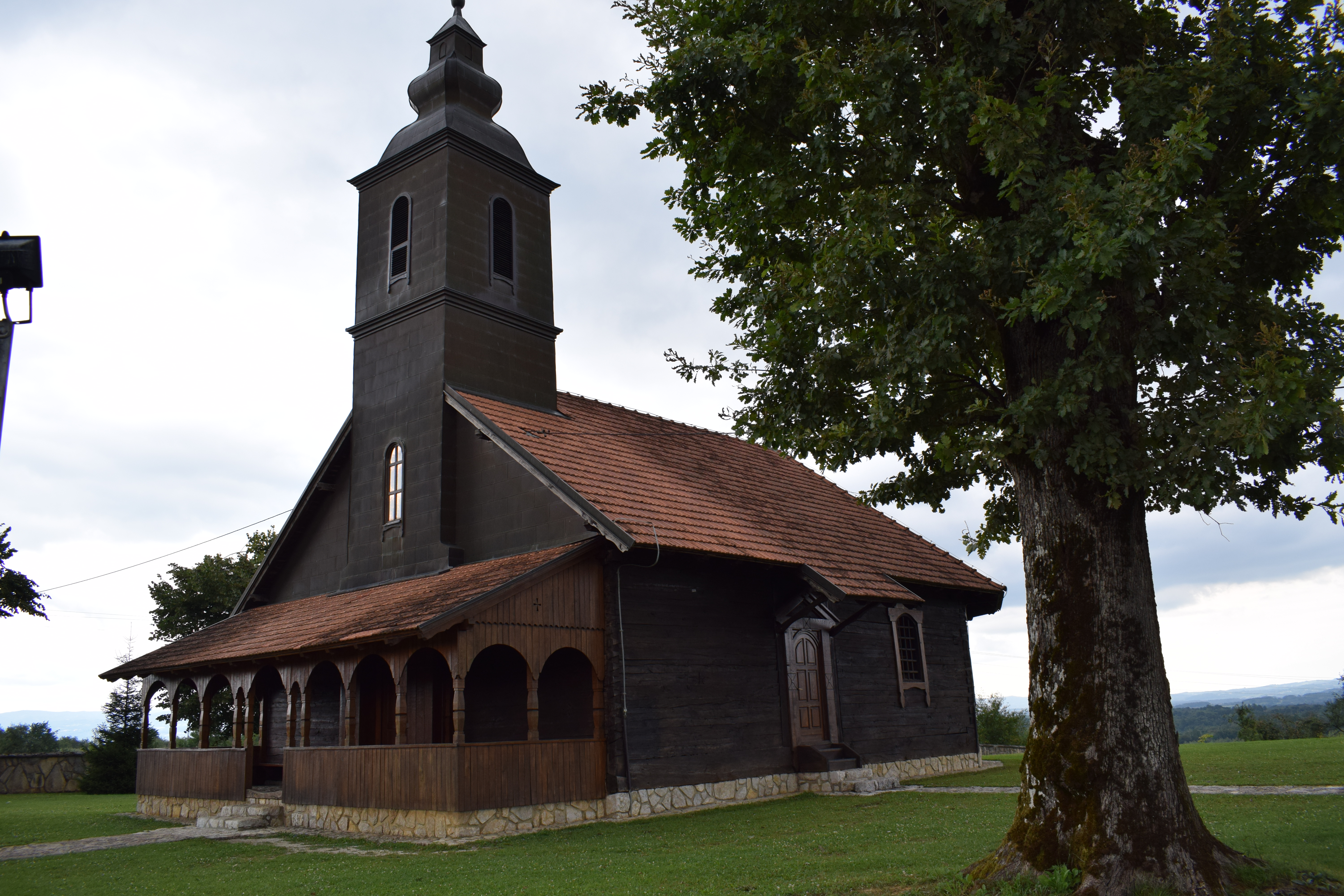 Црква брвнара у Бусновима посвећена је Вазнасењу Господњем. Тачно вријеме градње се не зна јер би 1870. година, која се налази урезана изнад улазних врата, могла бити година градње или једне од бројних обнова. Сигурно је да је главни мајстор био Симо Стојић из Буснова. По широкој заравни, гдје се налази, у народу је познатија као црква Спасовица. Дрвене греде су изворно биле положене на земљу, а у једној значајнијој санацији, 1924. године, подигнуте су на камени подзид. Велика обнова и санација цркве извршена је у периоду од 1994.-1995. године. Урађен је нови иконостас којег је осликао академски сликар из Бањалуке, Љубомир Гајић. Црква брвнара у Бусновима припада парохији Буснови коју чине села Буснови, Томашица и дио Криваје. Пред црквом се за Преображење одржава велики народни збор. У Бусновима је рођен и крштен садашњи Еписком бањалучки Јефрем.